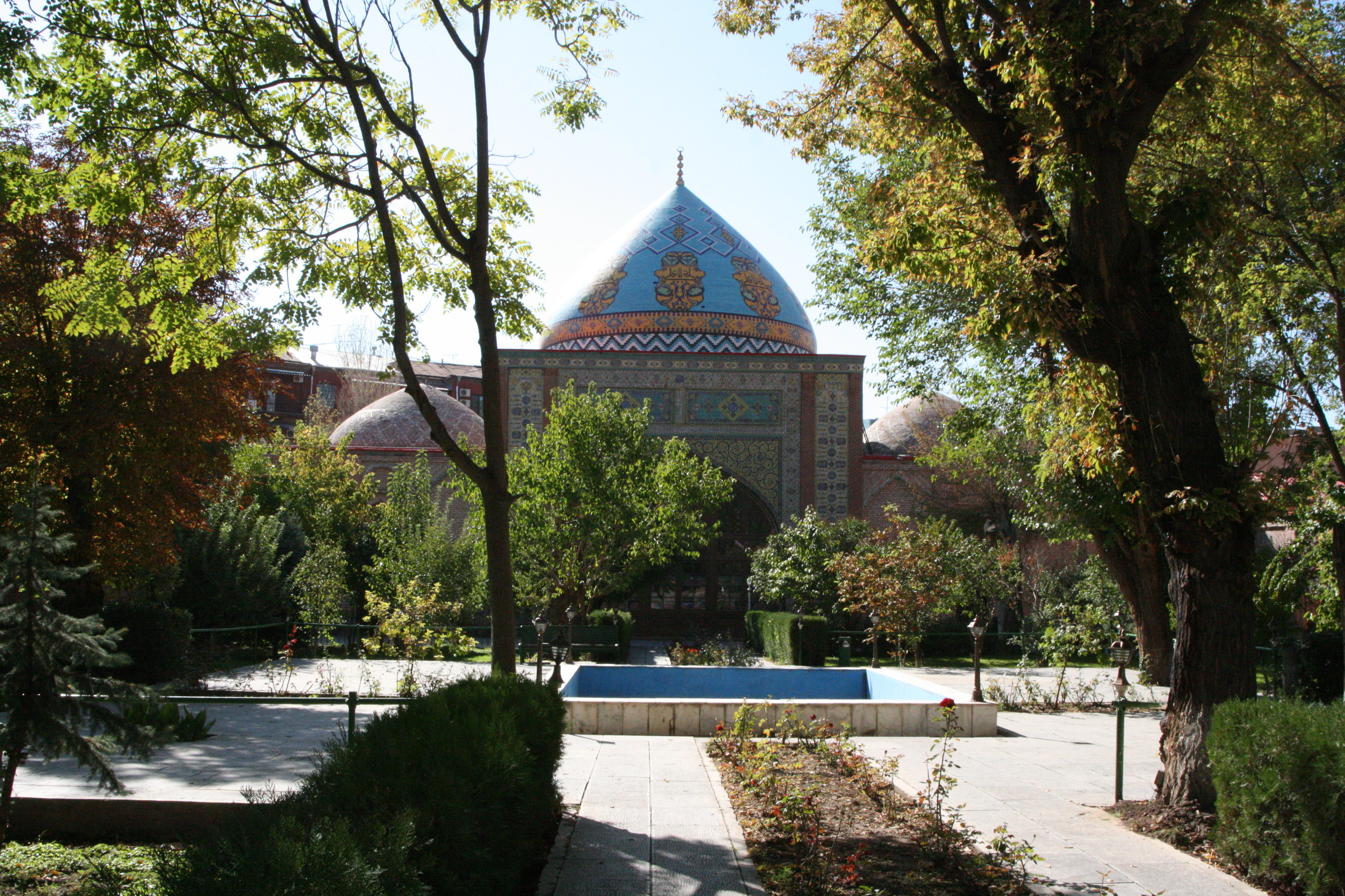 Kentron, Yerevan, Armenia 6/150